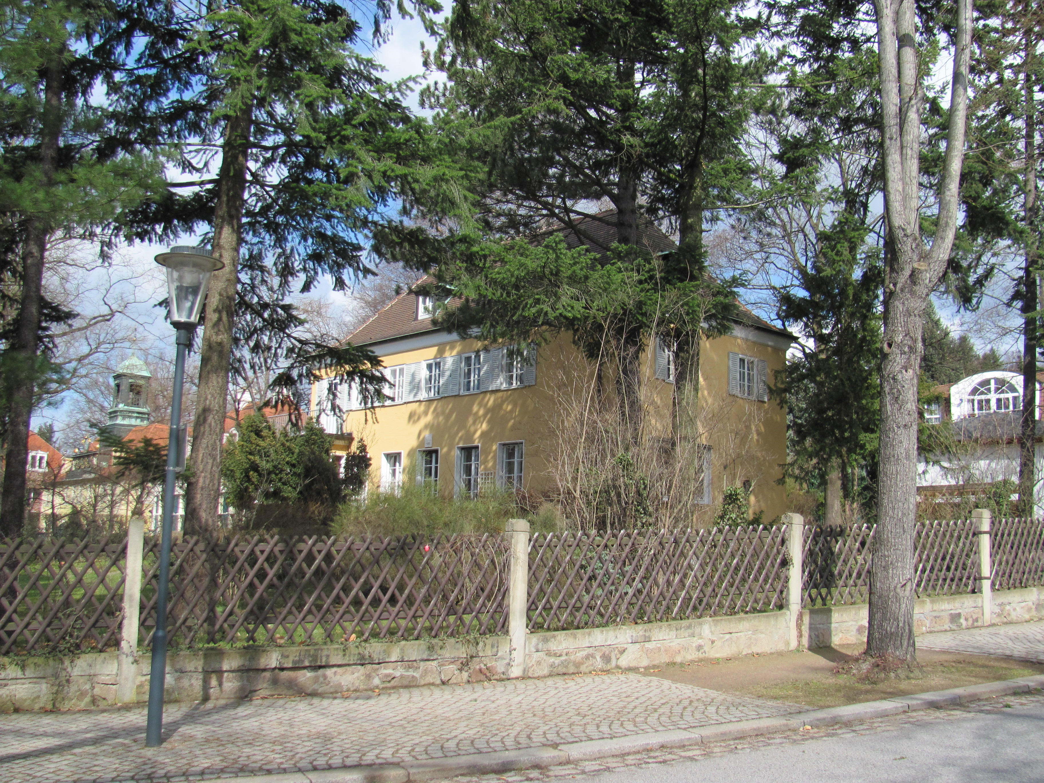 Radebeul Einfamilienhaus Alfred Schädler